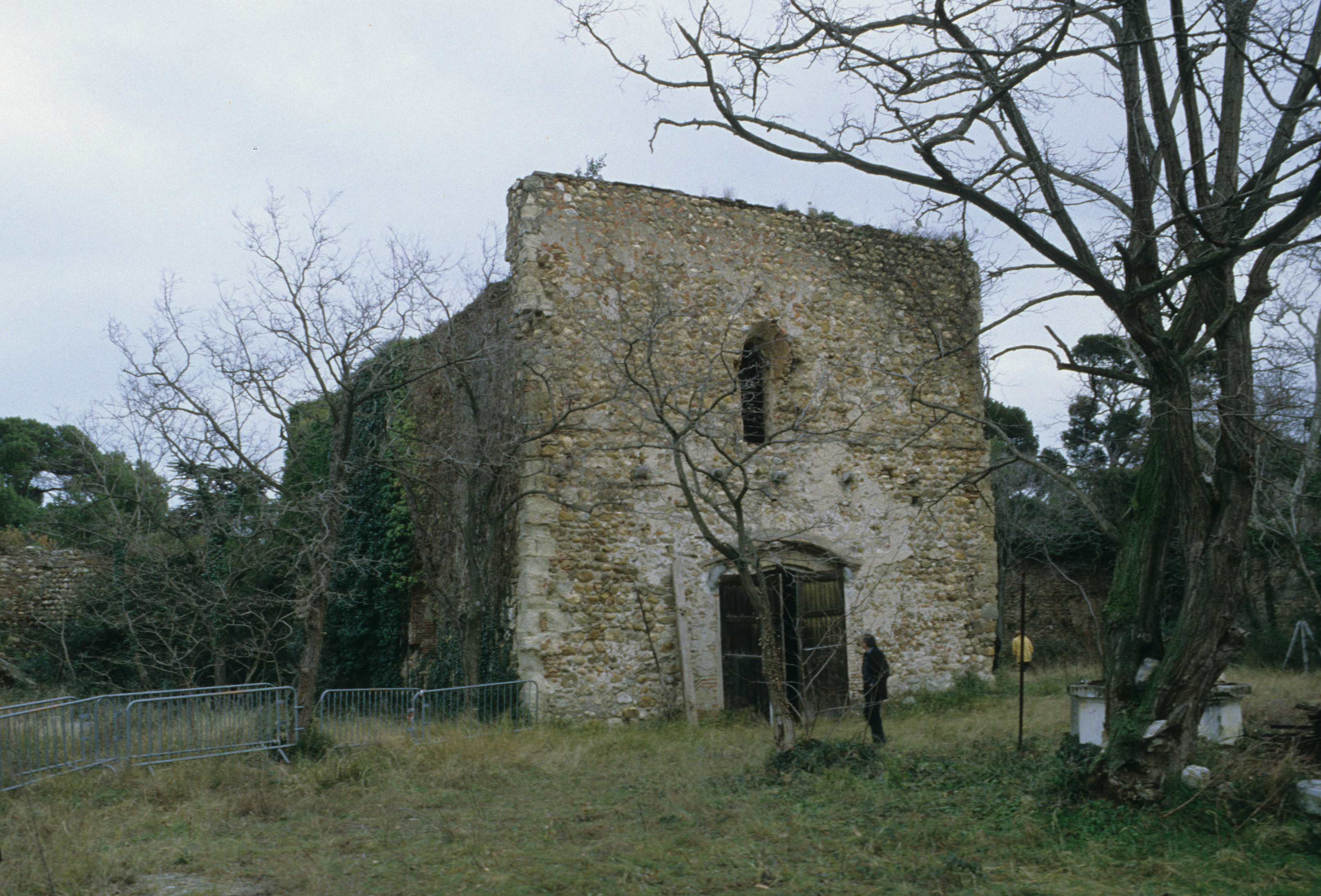 El Masdéu (Rosselló). Església conventual de la comanda del Masdéu. Estat en què quedà després del bombardeig de 1944. Any 1998.